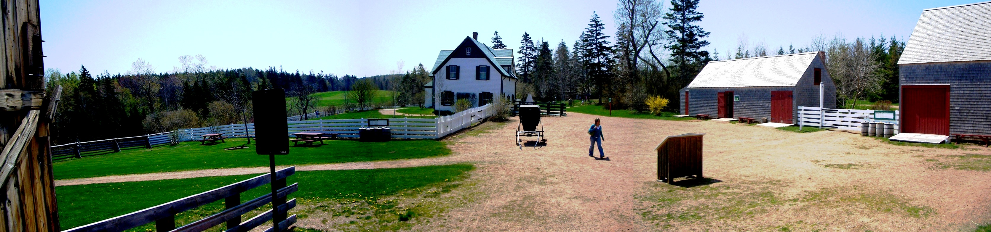 Панорама фермы Зеленые Мезонины